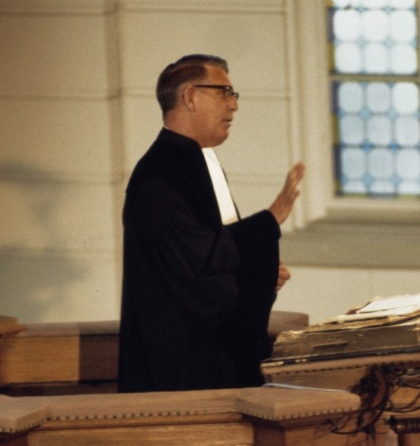 Doop van Prins Maurits in de Grote Kerk te Apeldoorn; ds.dr. H. Berkhoff tijdens preek